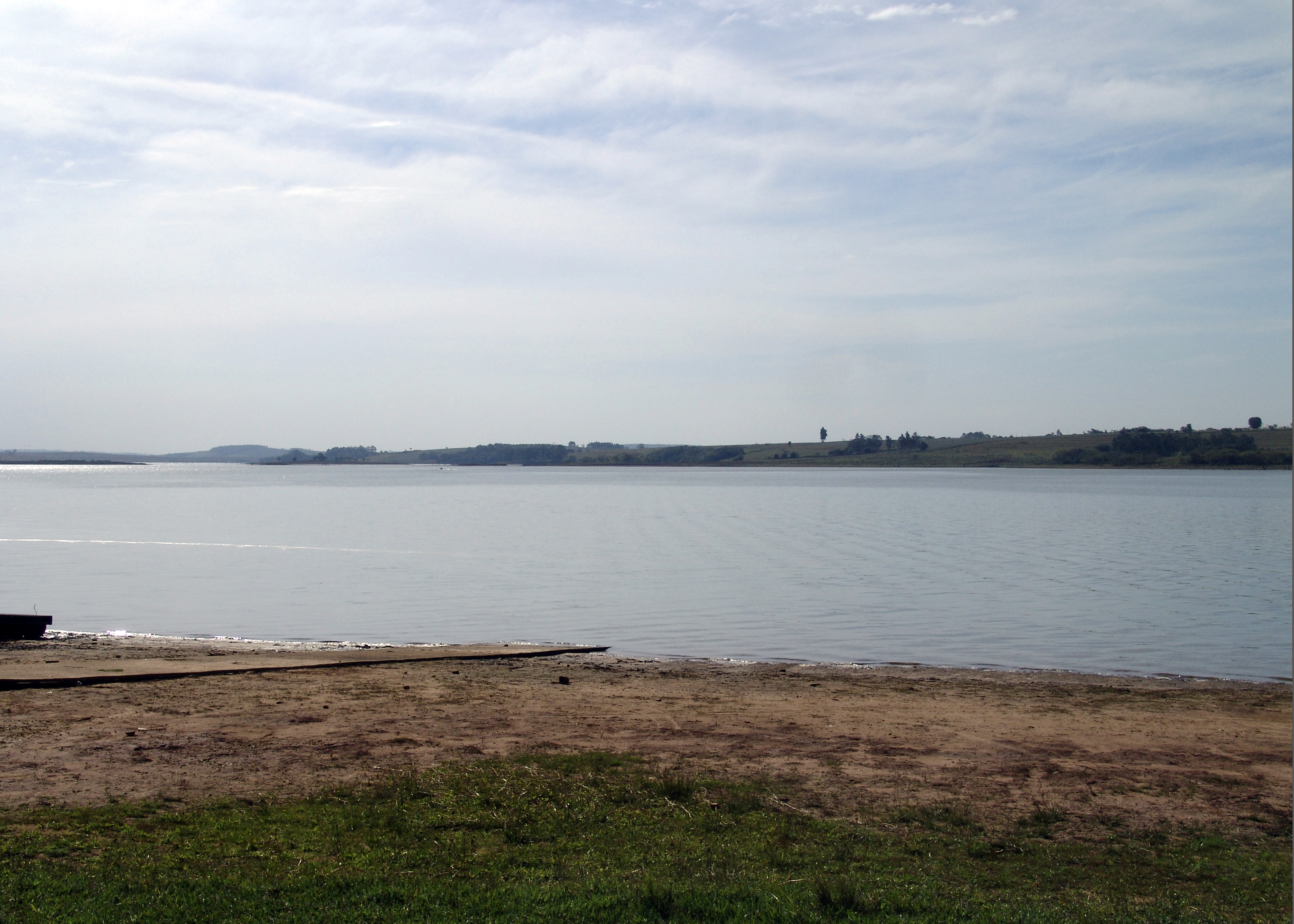 Vista do rio Taquari, da ponte da estrada estadual SP-255, Taquarituba, São Paulo, Brasil